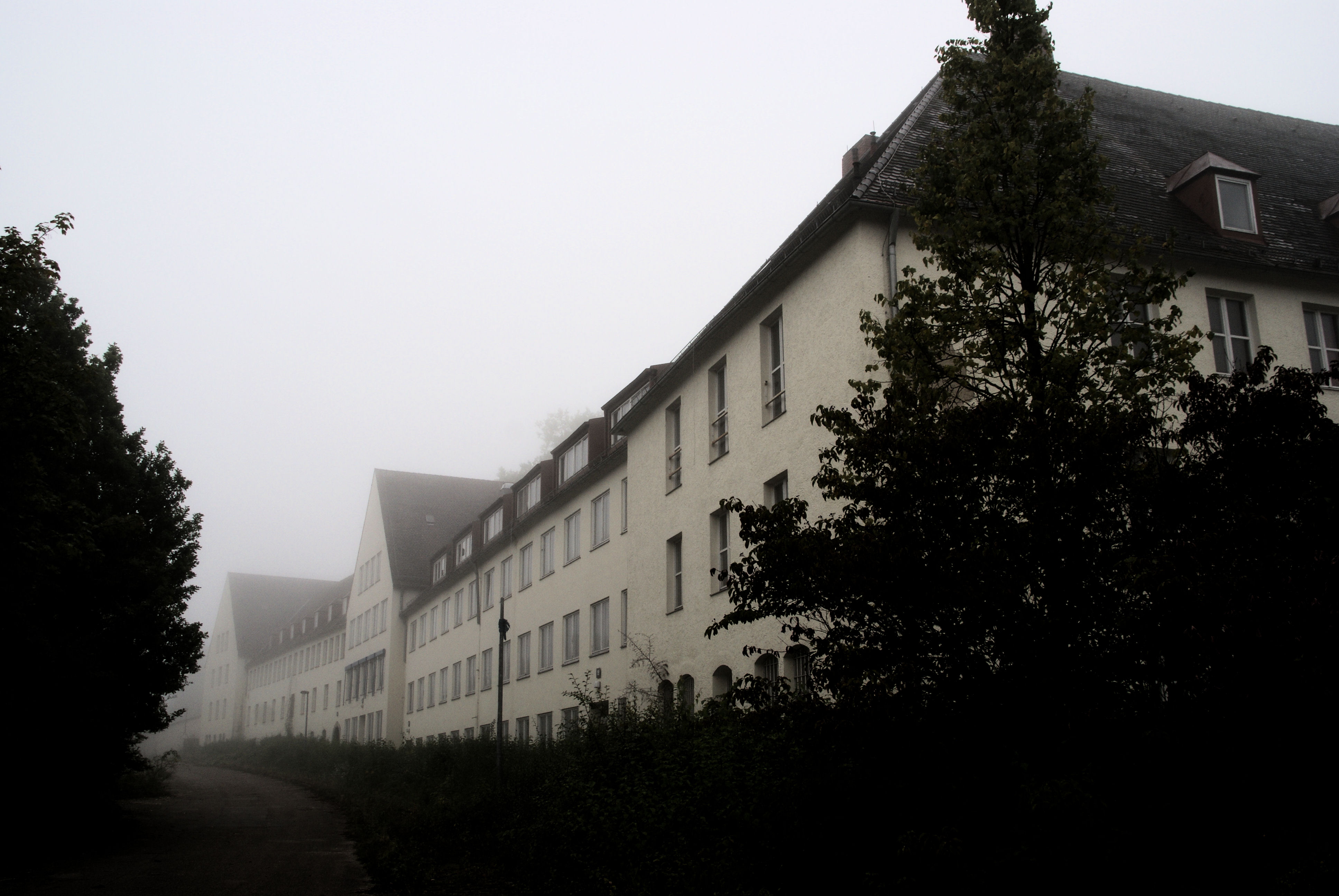 Nibelungenkaserne Regensburg, kleiner Schlangenbau, kurz vor dem Abbruch